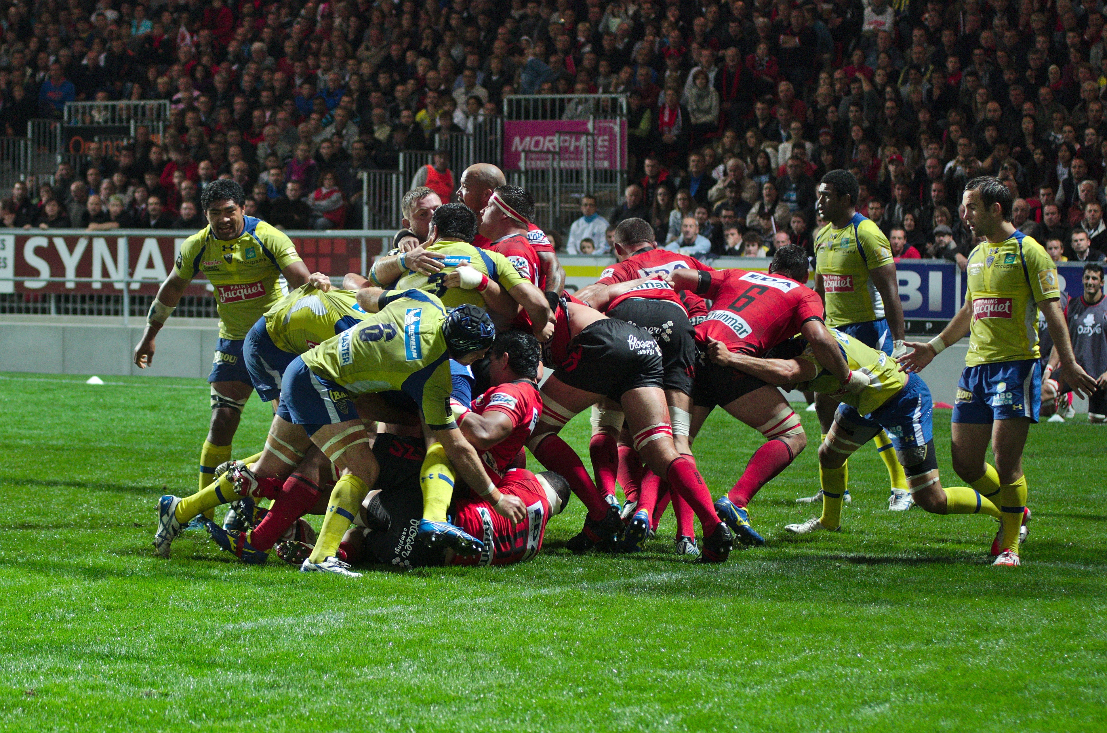 USO-ASM - 20140927 - Melée